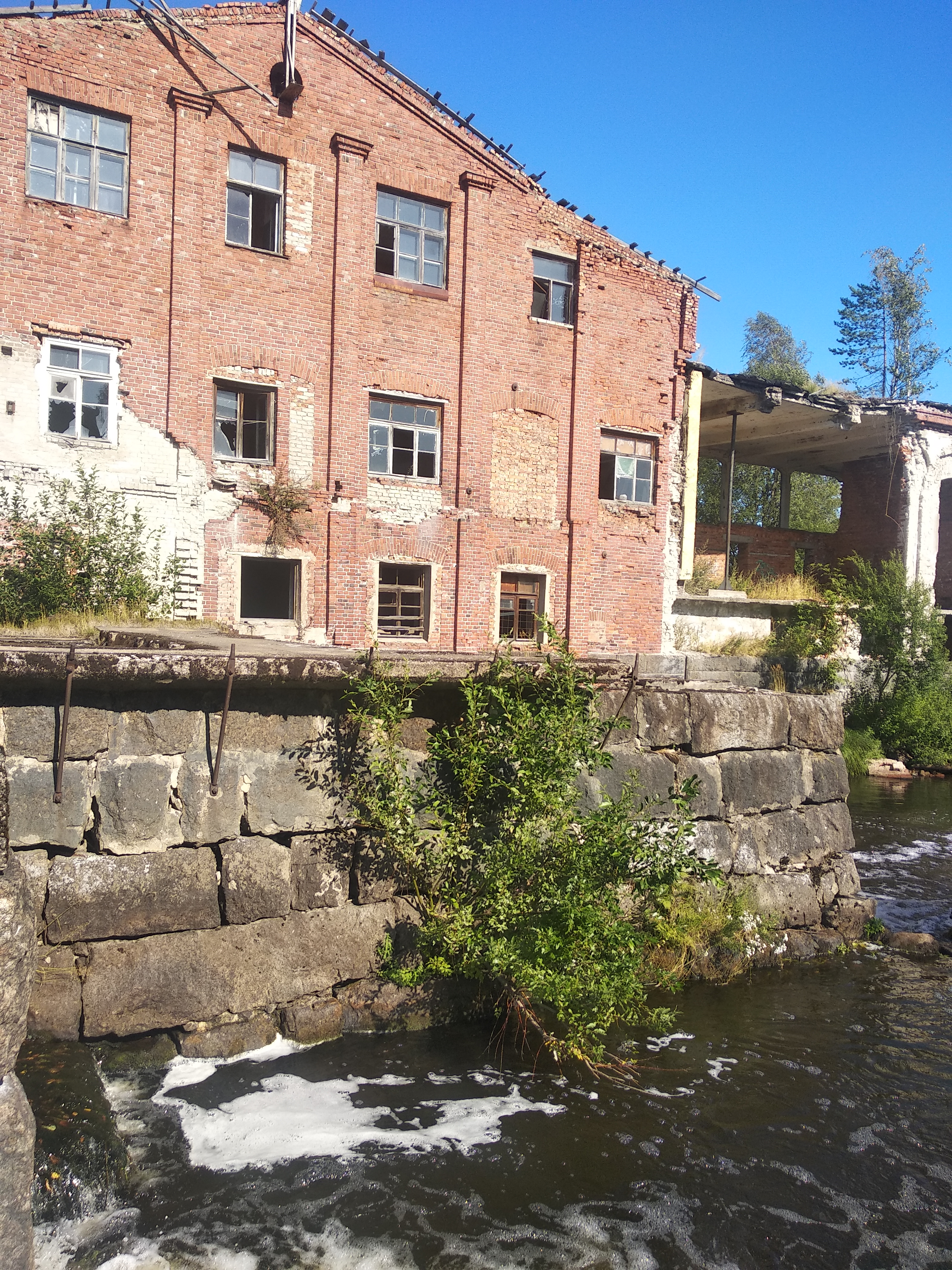 Фото основного здания _17.08.2019